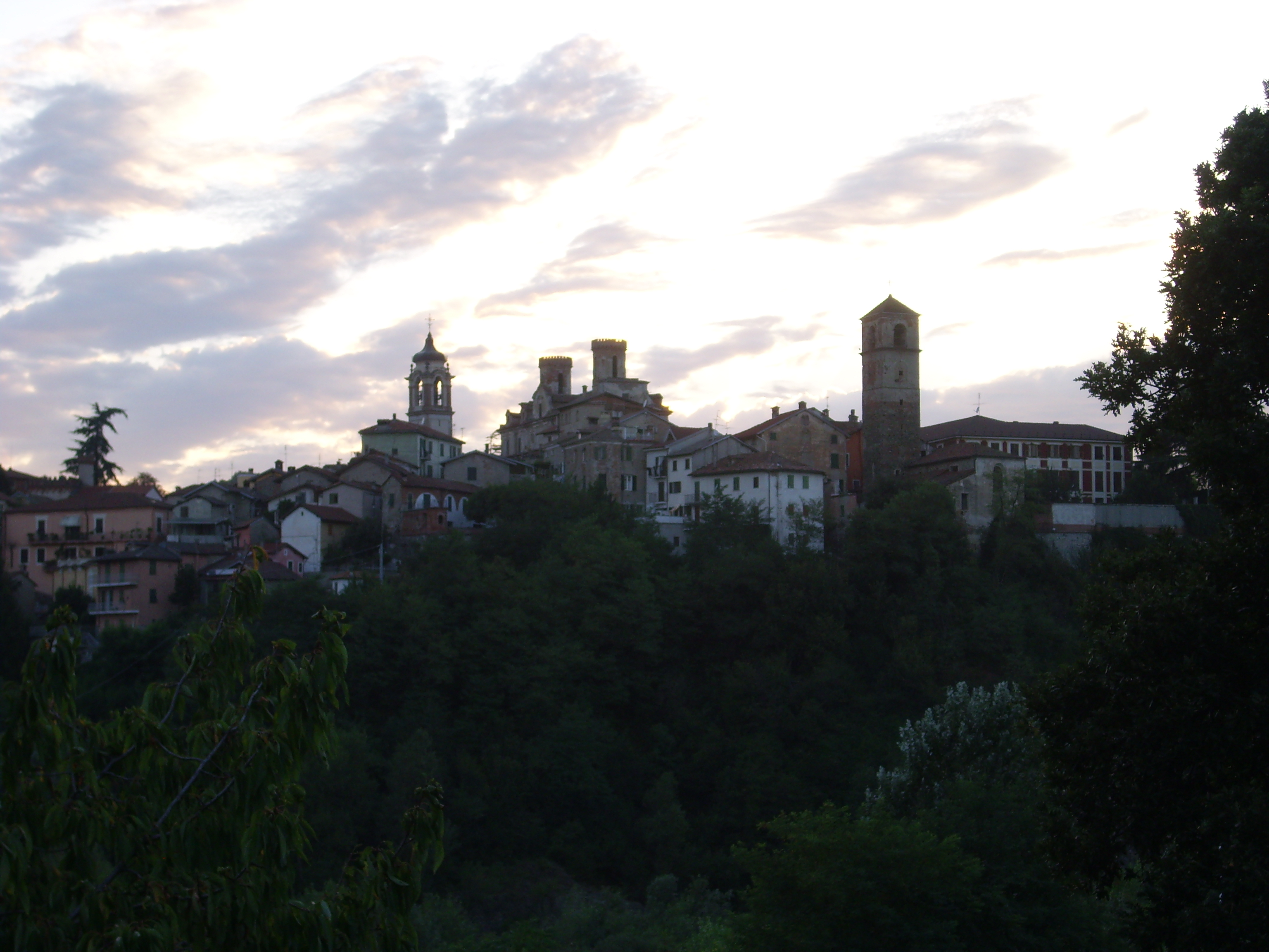 Molare, in provincia di Alessandria